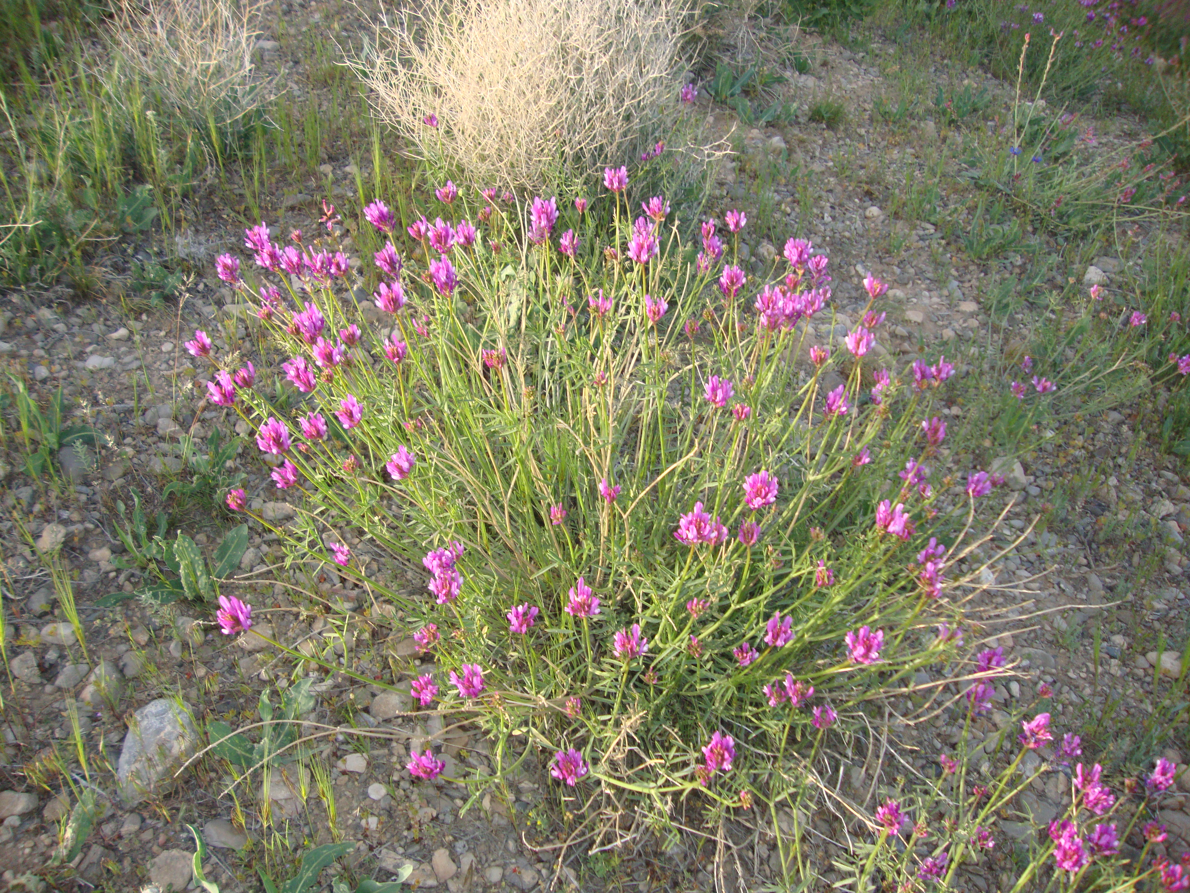 این عکس مربوط به پوشش گیاهی از روستای زالی است که توسط احمد نیک گفتار در سال1391 تهیه گردیده است